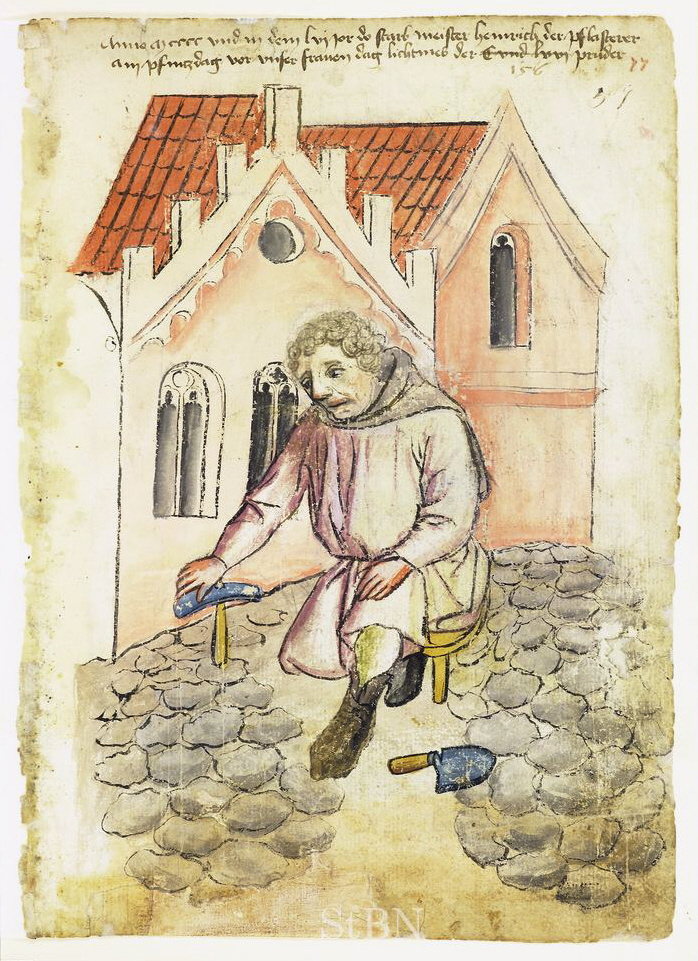 heinrich (Heinrich) N.N. , pflasterer (Pflasterer) Transkription und weitere Informationen